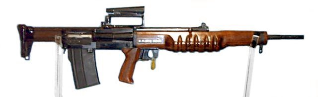 EM-2 rifle